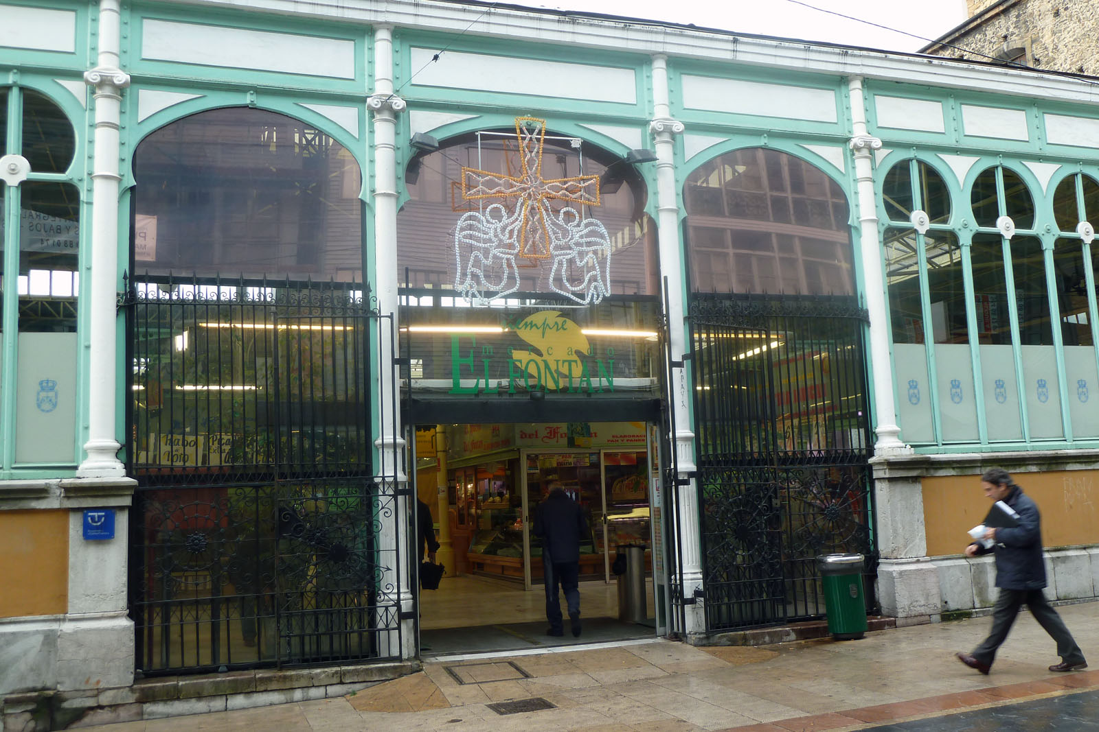 Oviedo